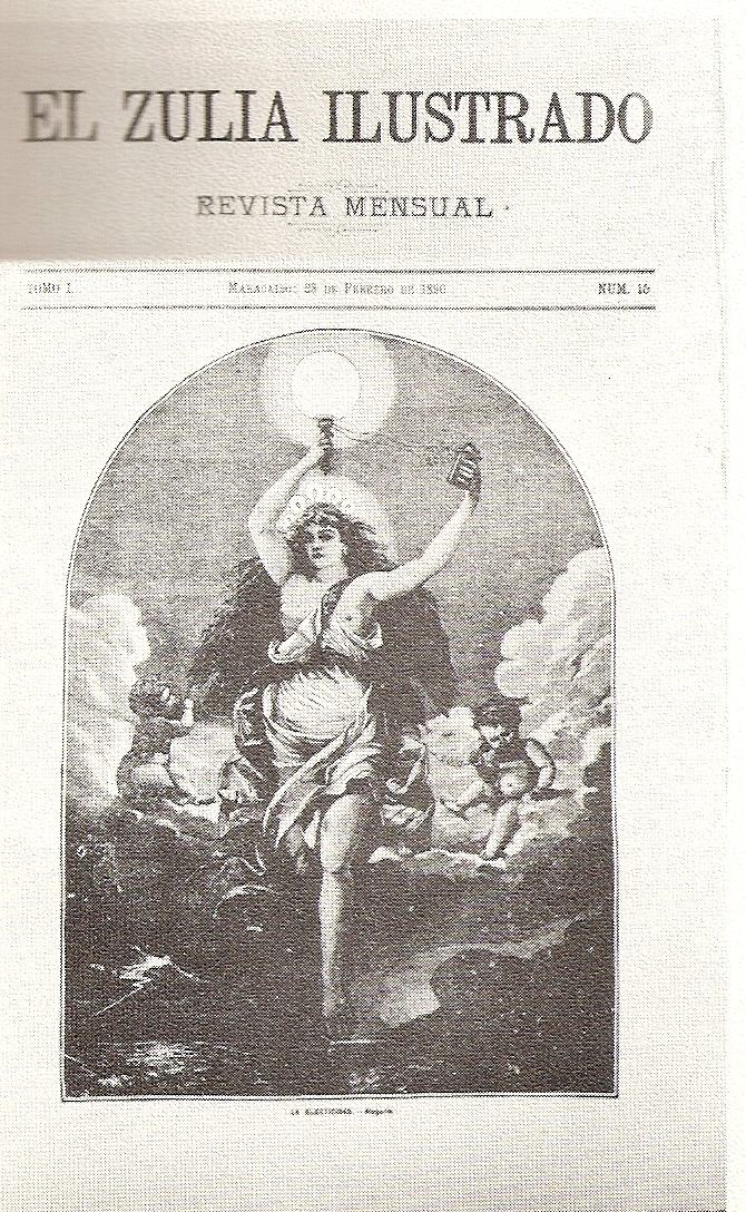 Prensa Venezolana del siglo XIX: El Zulia Ilustrado 1890